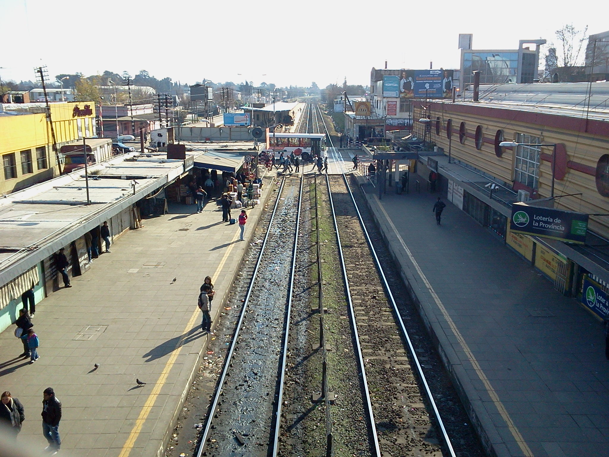 A Pilar desde puente